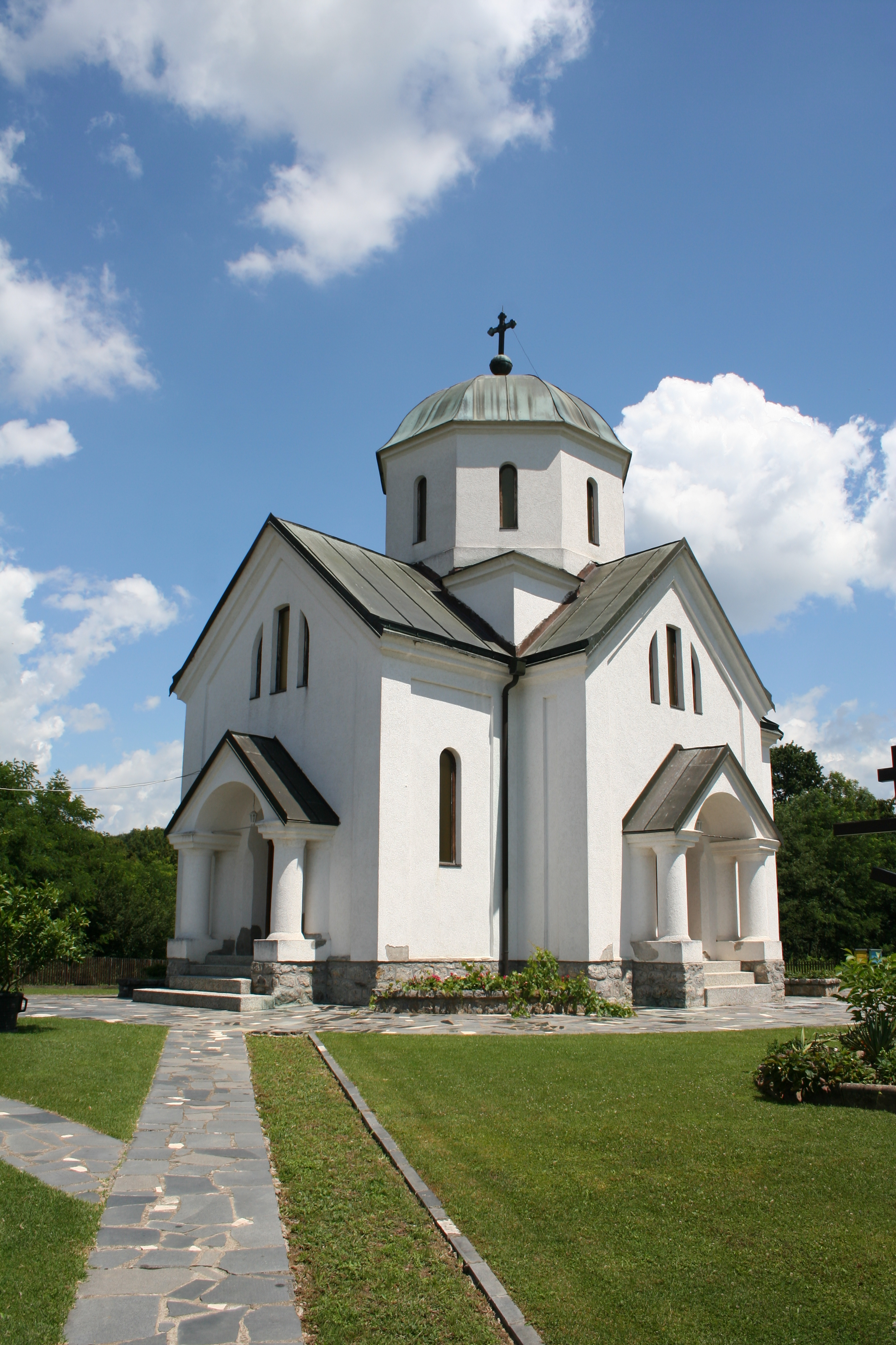 Crkva Sv. Georgija, Mojković